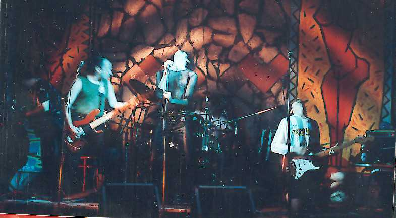 Los Triciclosclos tocando en el Club Nocturno llamado Vias, en la Ciudad de Buenos Aires, en 1993.